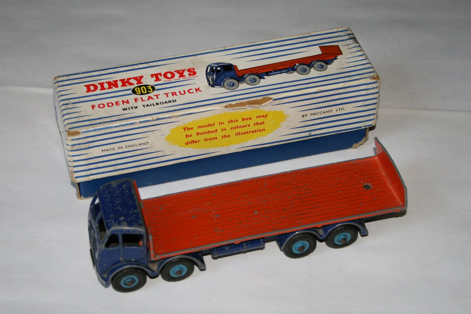 Dinky Supertoys 903 - Foden Flat Truck (1)